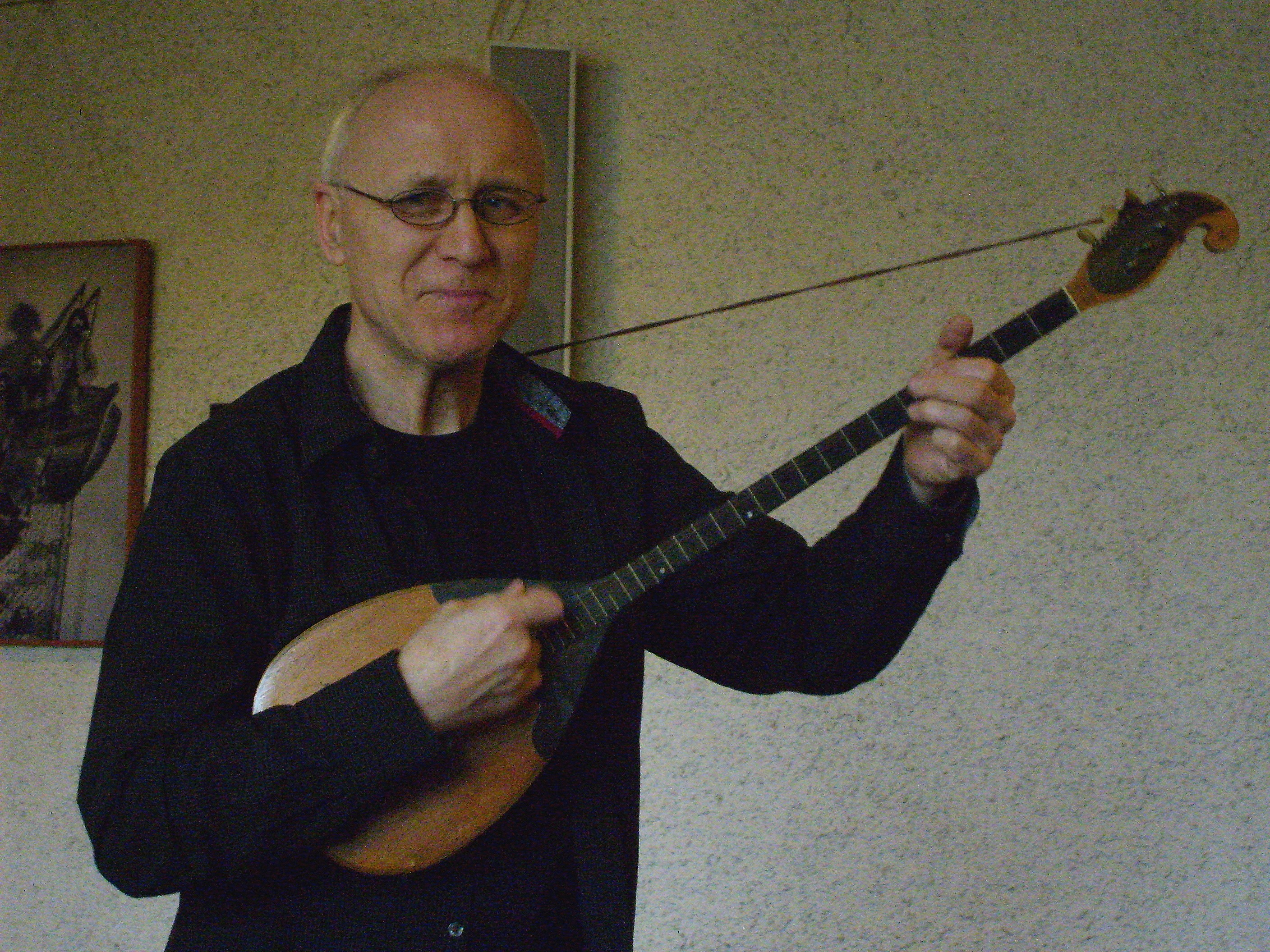 Český multiinstrumentalista Tomáš Najbrt hraje na brač, Kostel U Jákobova žebříku, Praha-Kobylisy.